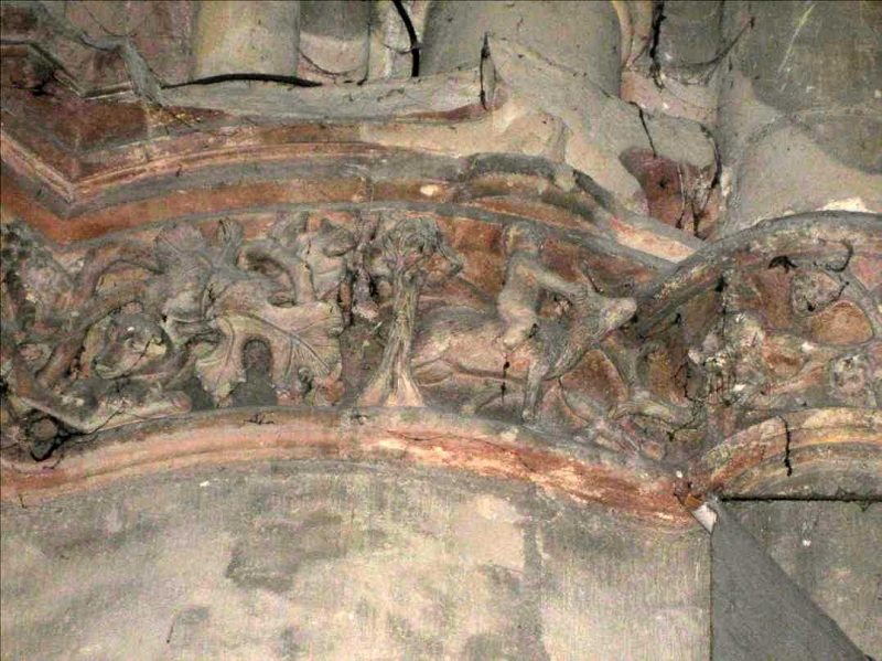 Le "Sanglier", dans la Cathédrale de Nevers